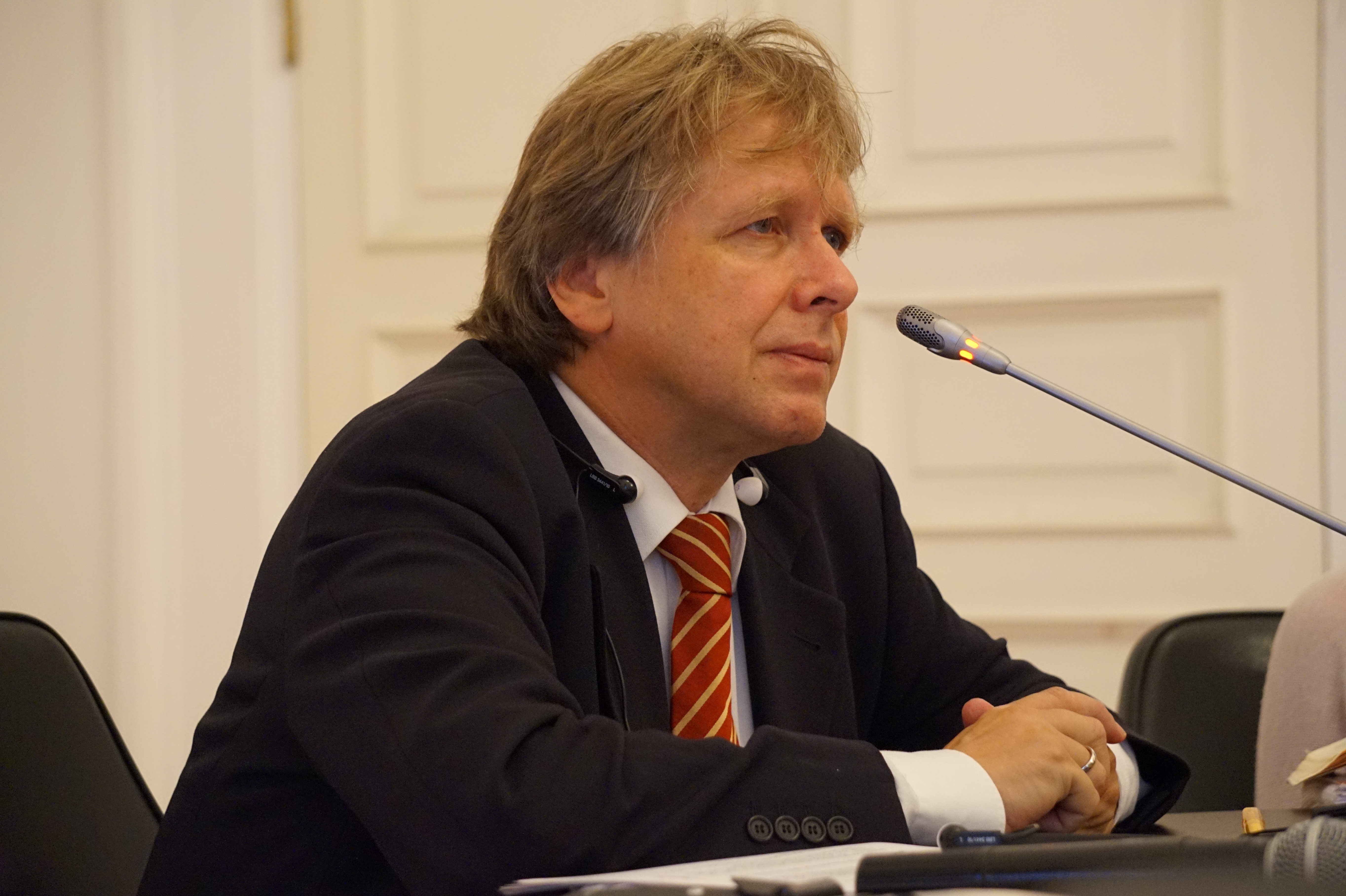 პროფ. ჰაინრიხი ბათუმში, 2017 წ.